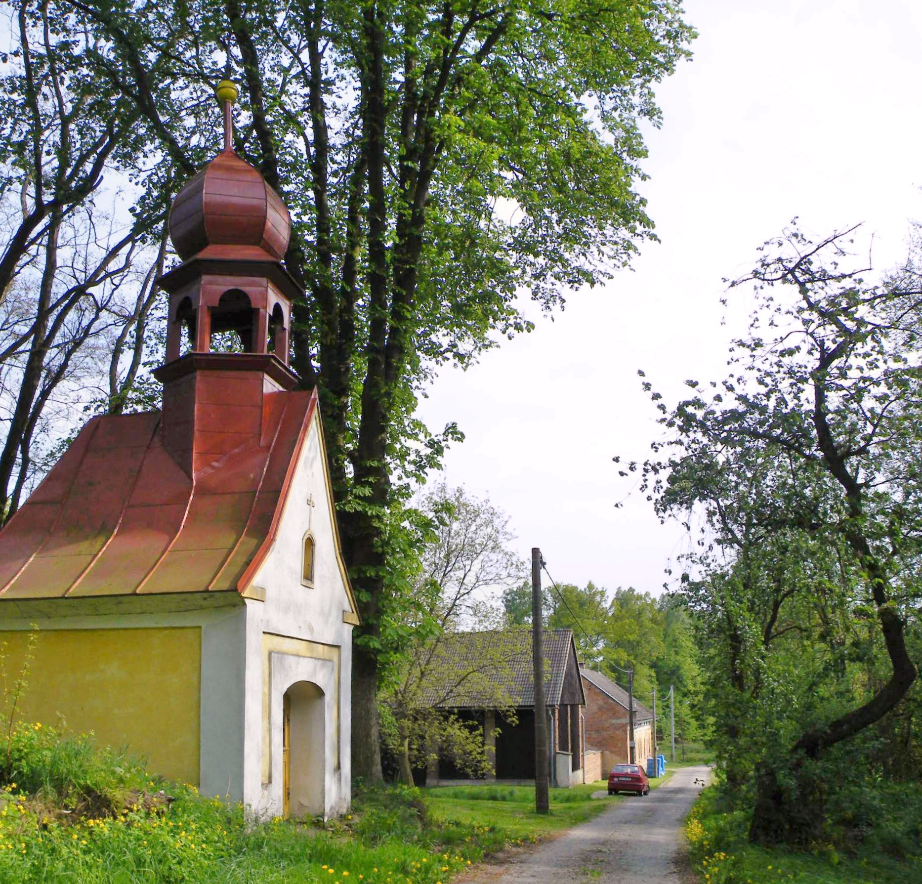 Komunikace ve Hvězdě (část obce Hřibojedy) Kaplička s cibulovou bání. Byla zbudovaná r. 1774 a opravena 1986. Souř.:50°22.635', 15°49.465'